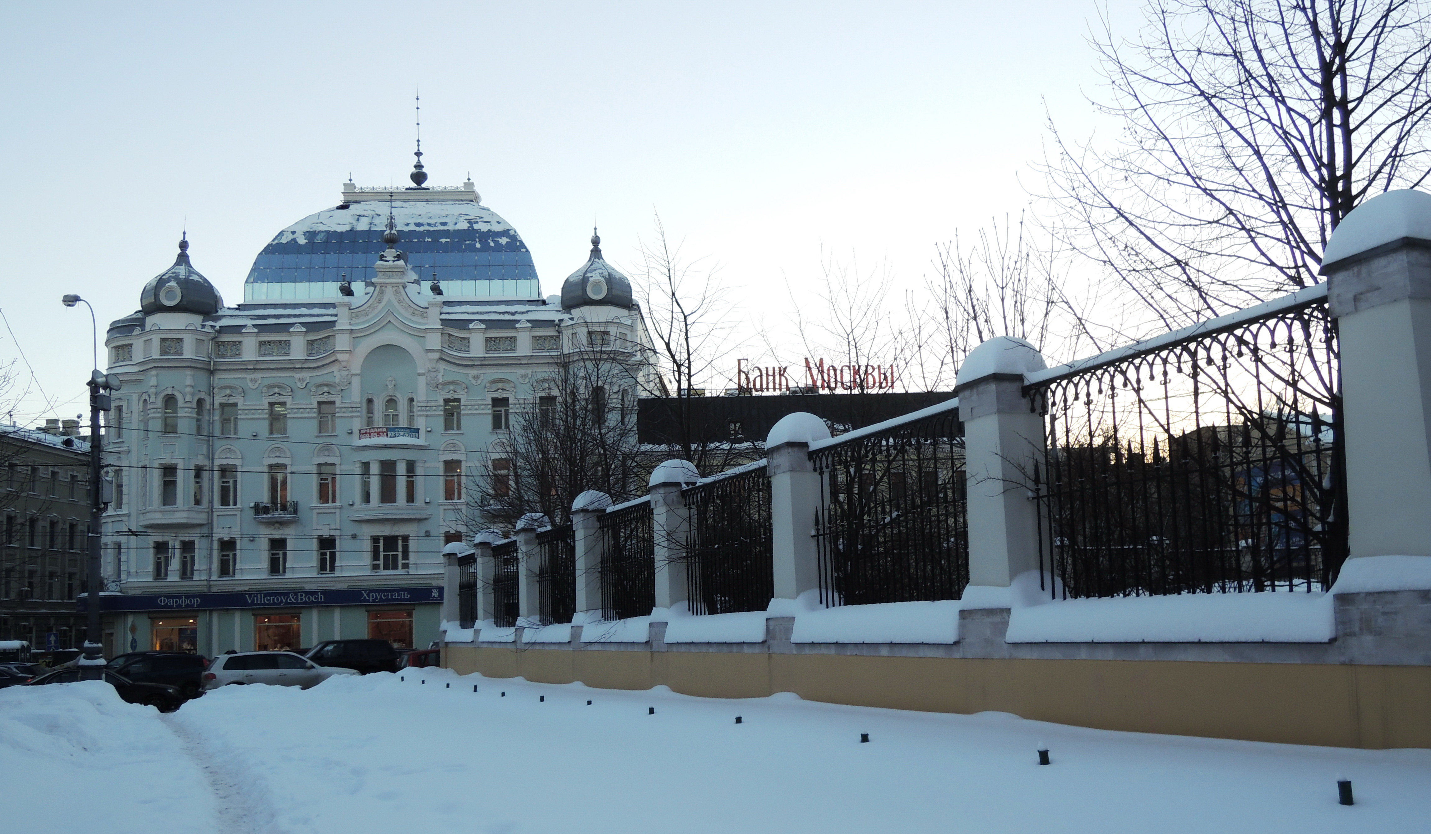 Большая Никитская ул., 31/15 с. 1 Ансамбль доходных домов 1901-1903 гг., архитектор Н. Д. Струков, В. П. Цейдлер. Никитская Б. ул., д.31/15, стр.1; Мерзляковский пер., д.15; Столовый пер, д.4 стр.1; д.6, стр.2